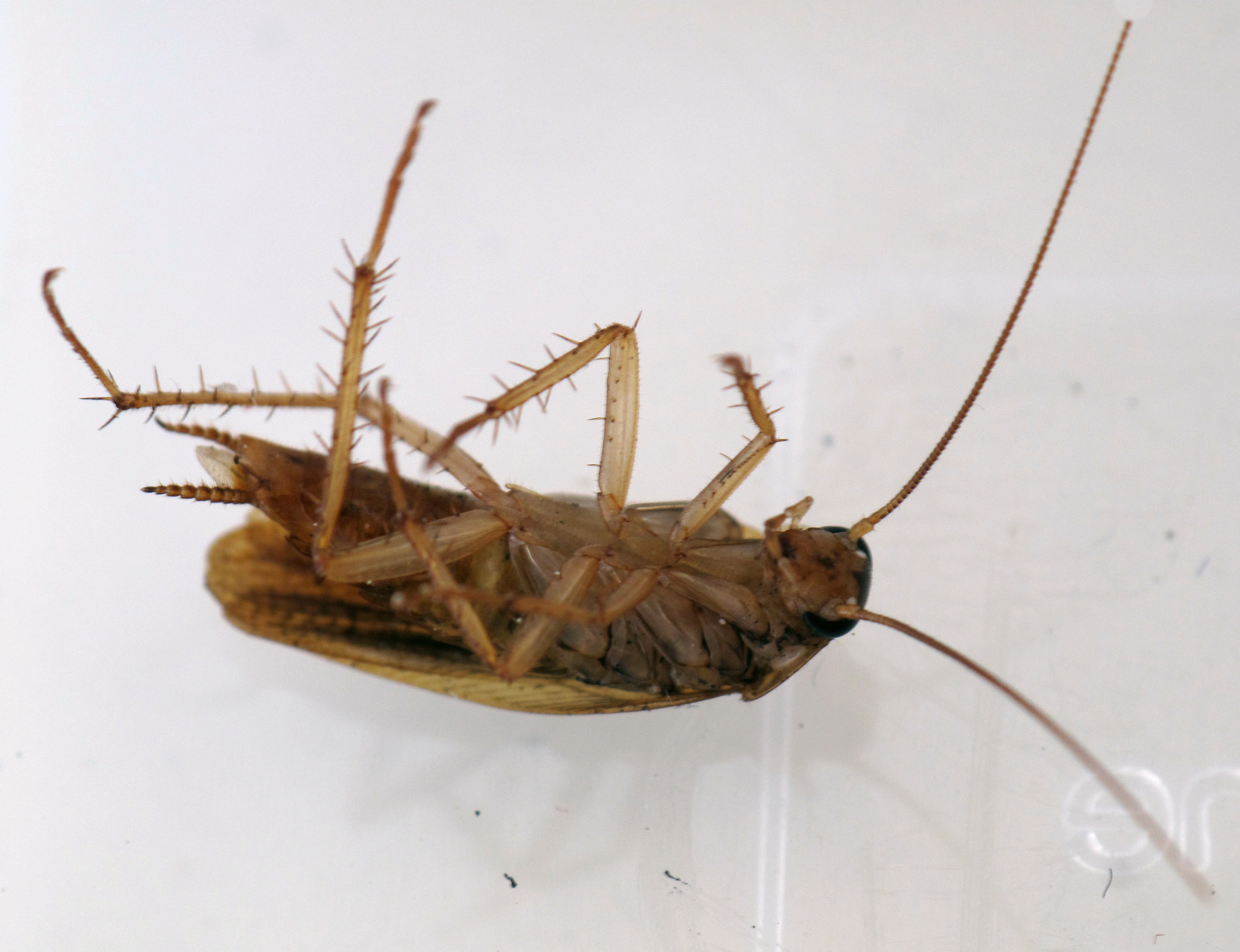 Blattella germanica en Santiago de Compostela